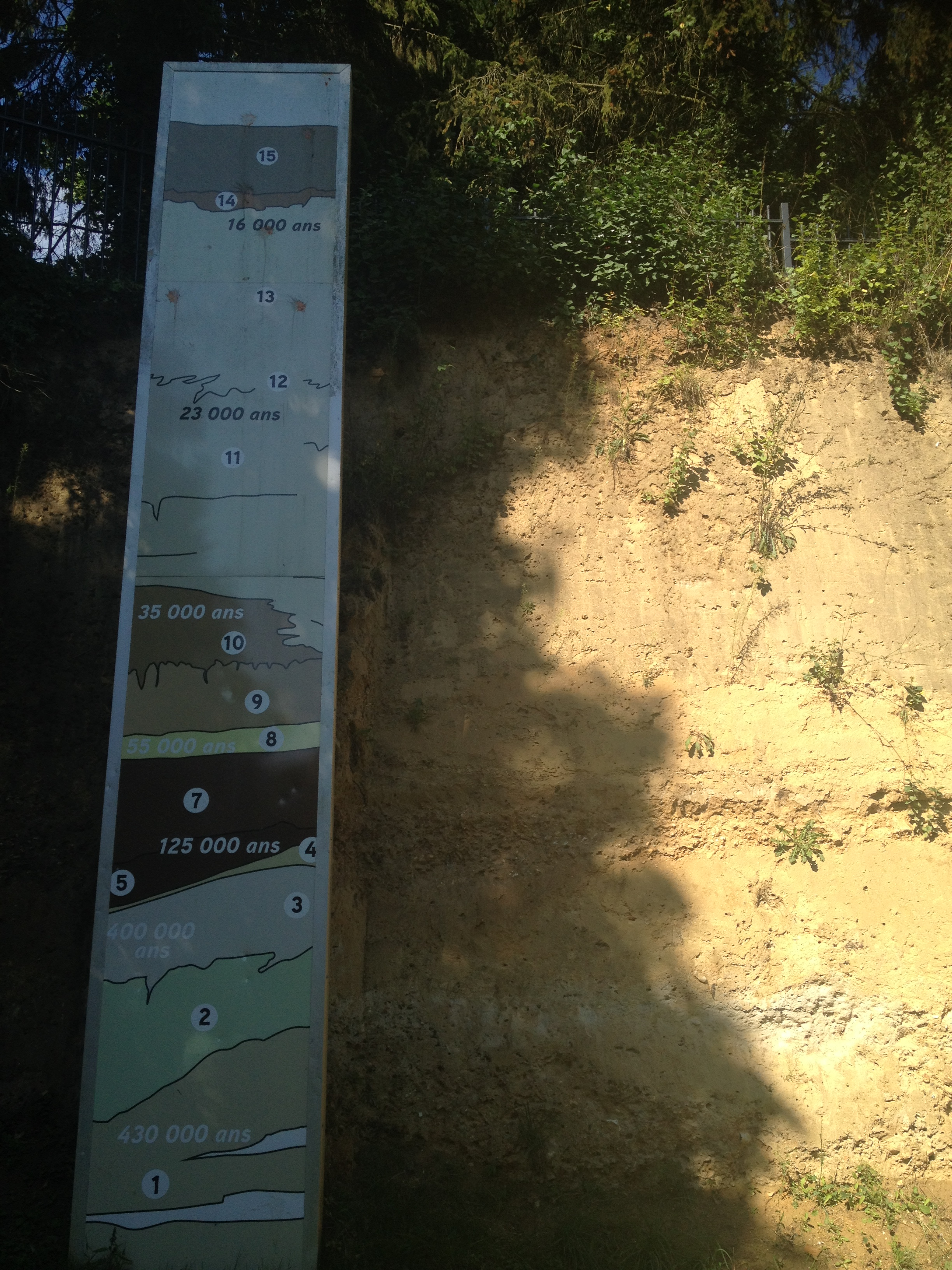 Pleistozäne Ablagerungen